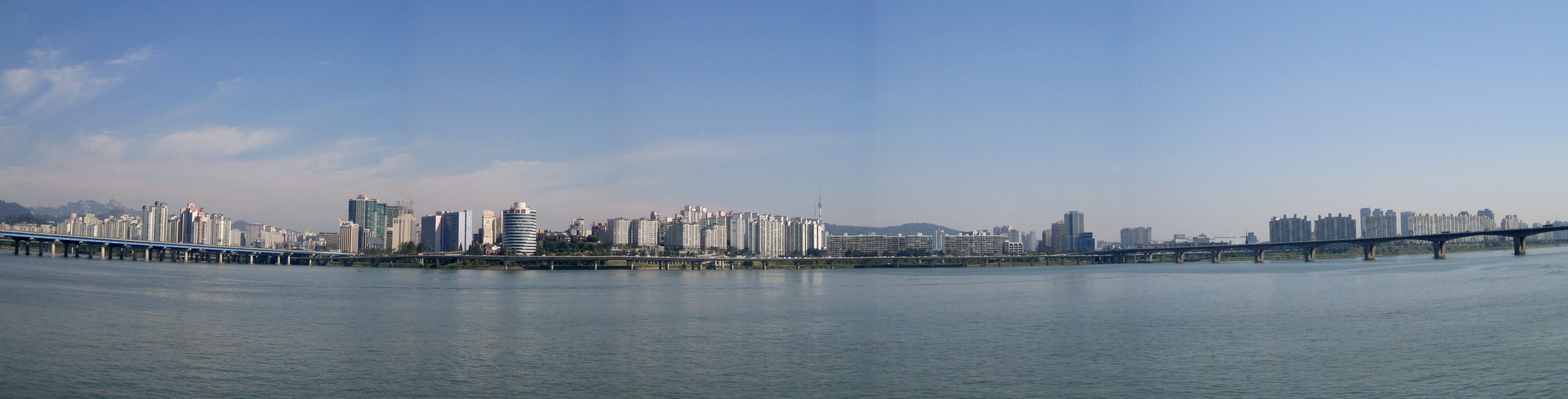 Panarama Seoul